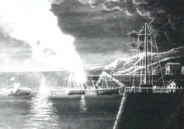 Méliès, viaggio nella luna (1902) 13